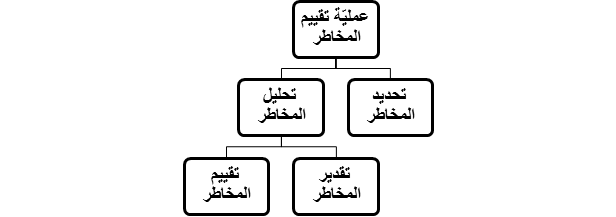 هذا المخطط يبين خطوات عملية تقييم المخاطر